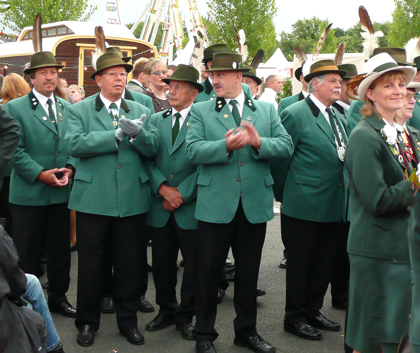 Schützen auf dem 'Schützenfest Hannover